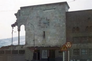 Skopje old RR station